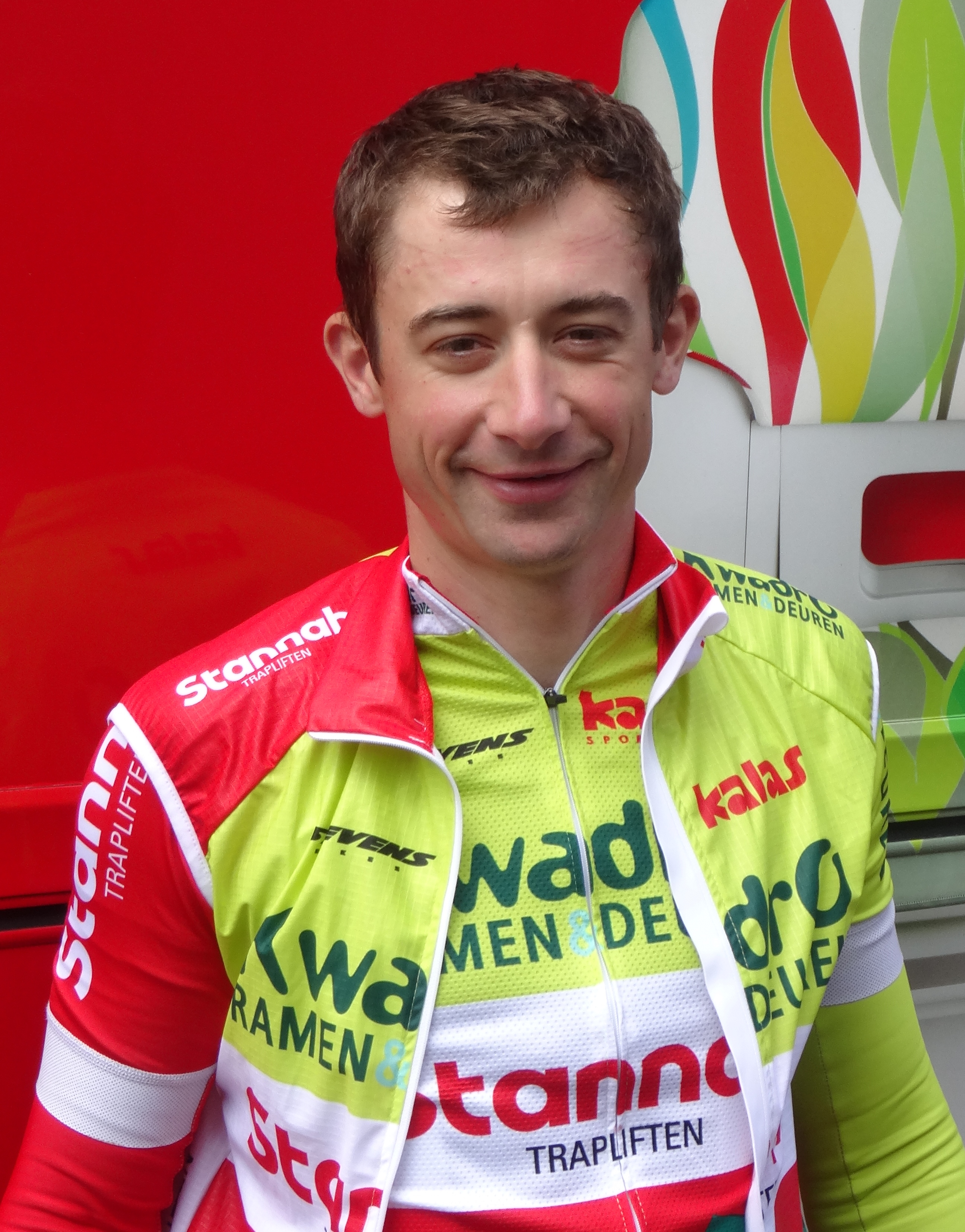 Reportage photographique réalisé le vendredi 30 mai à l'occasion du contre-la-montre individuel de la troisième étape du Tour de Belgique 2014 à Dixmude, Belgique.